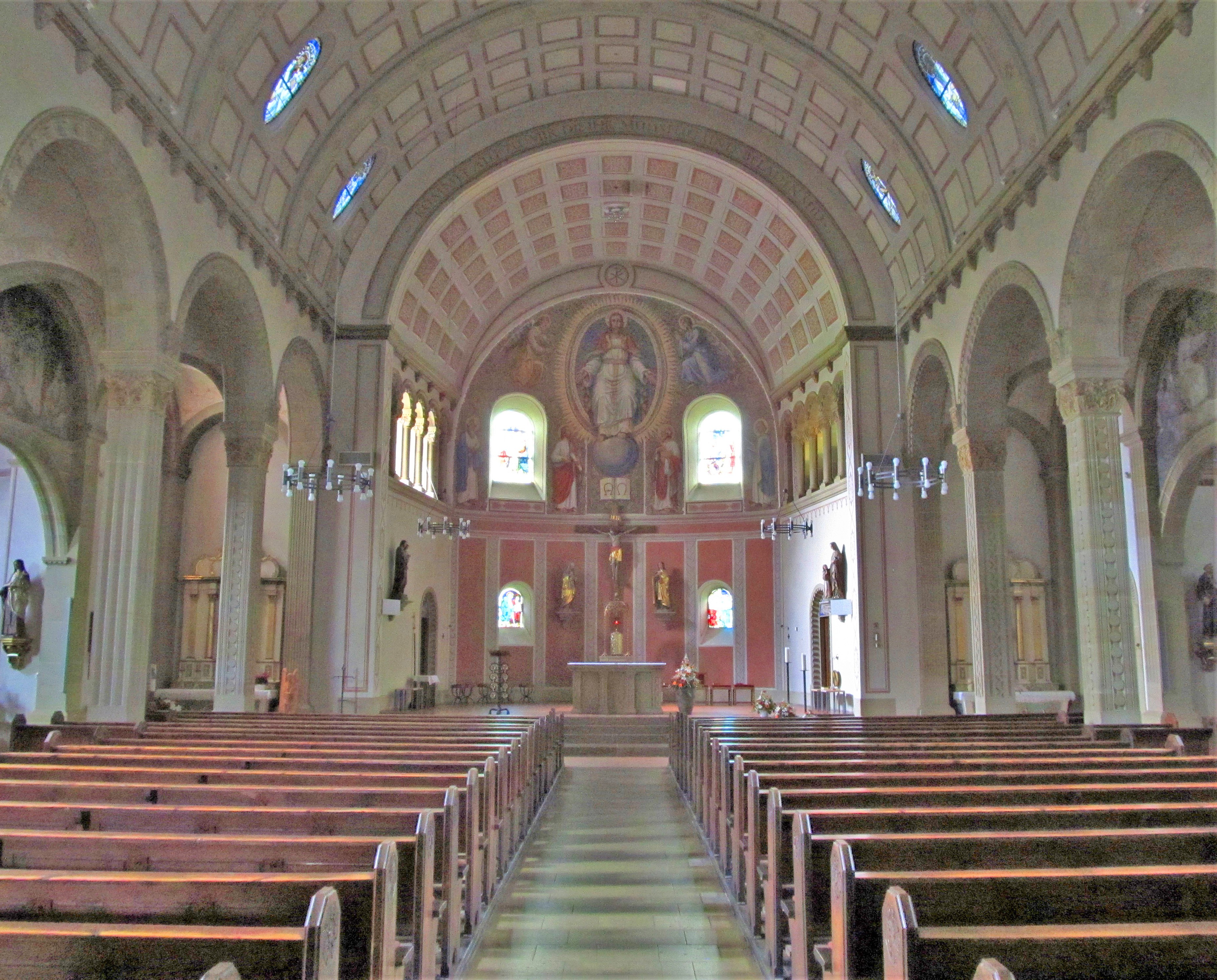 Blick ins Innere der katholischen Pfarrkirche St. Paulinus in Lauterbach, einem Stadtteil von Völklingen, Saarland